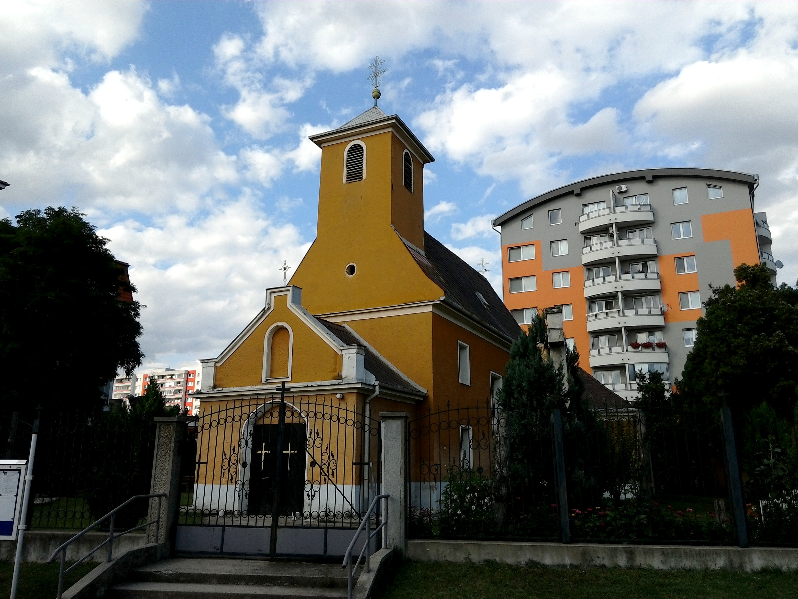 Bratislava-Podunajské Biskupice, Kostol svätého Jozefa v miestnej časti Komárov